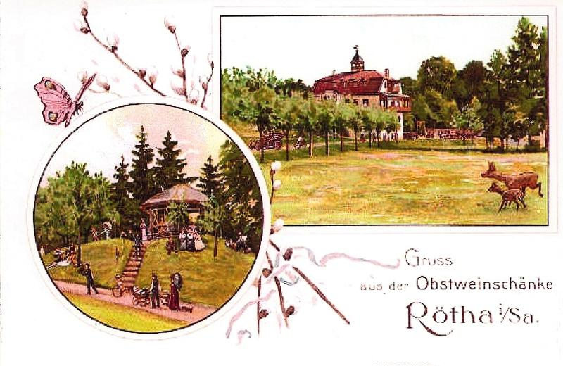 Potkarte von Friesensche Obstweinschänke Rötha